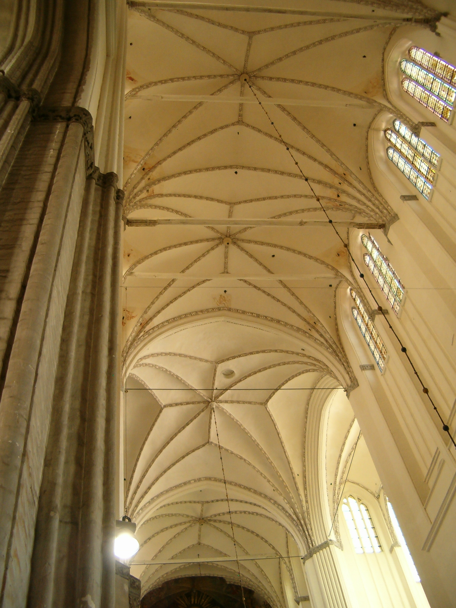 Gewölbe der Marienkirche Rostock